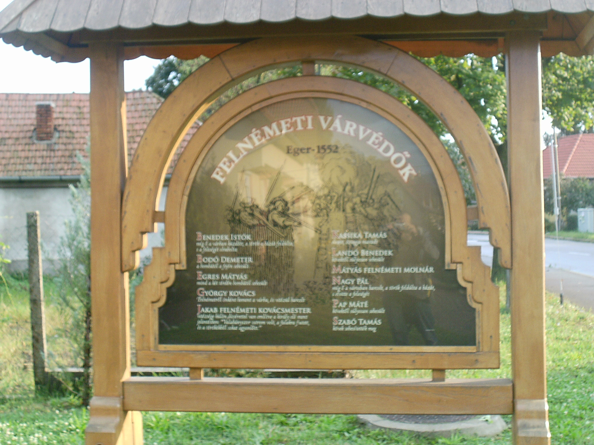 Az egri vár felnémeti védői 1552-ben